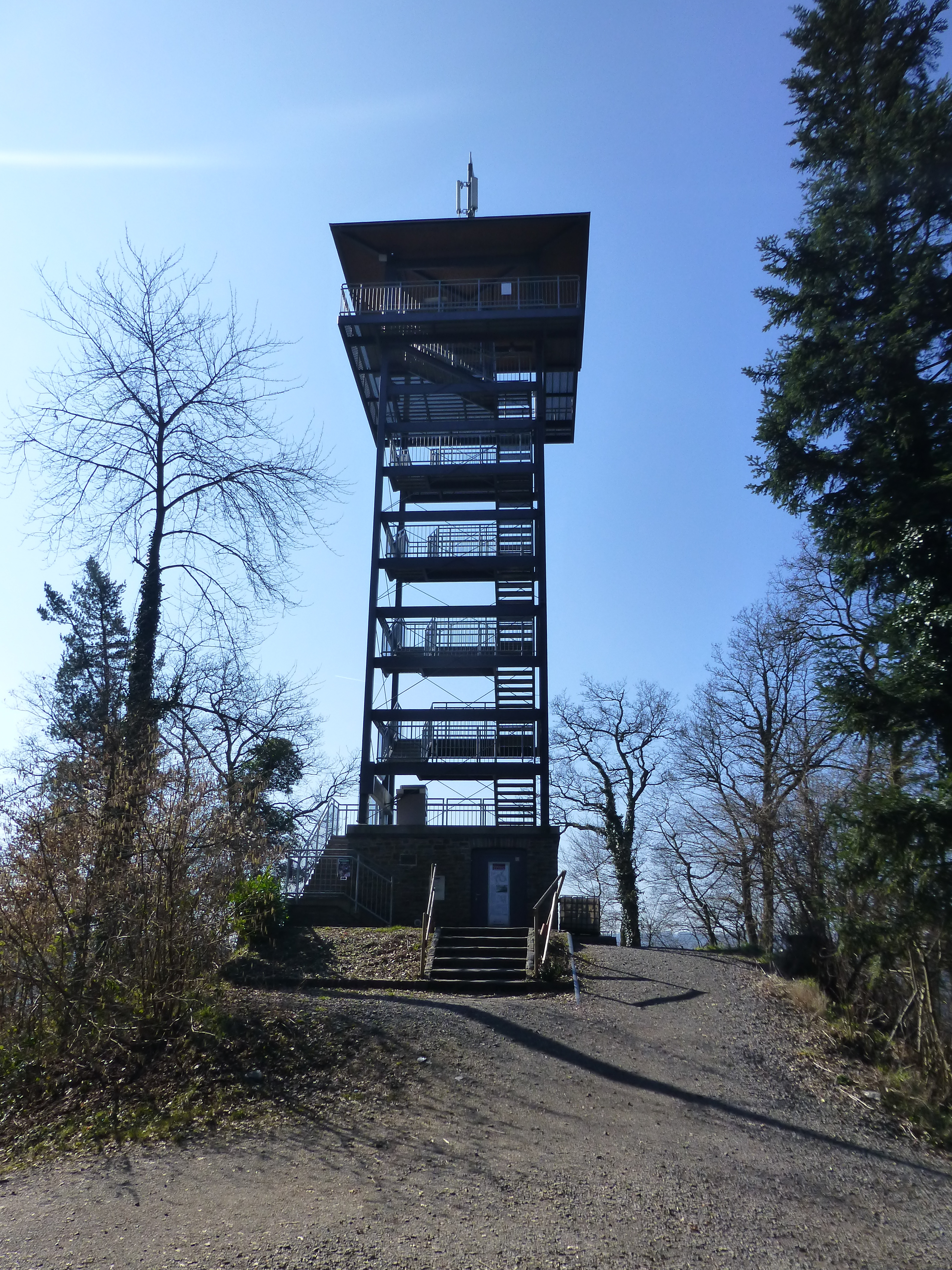 Prinzenkopfturm 2016